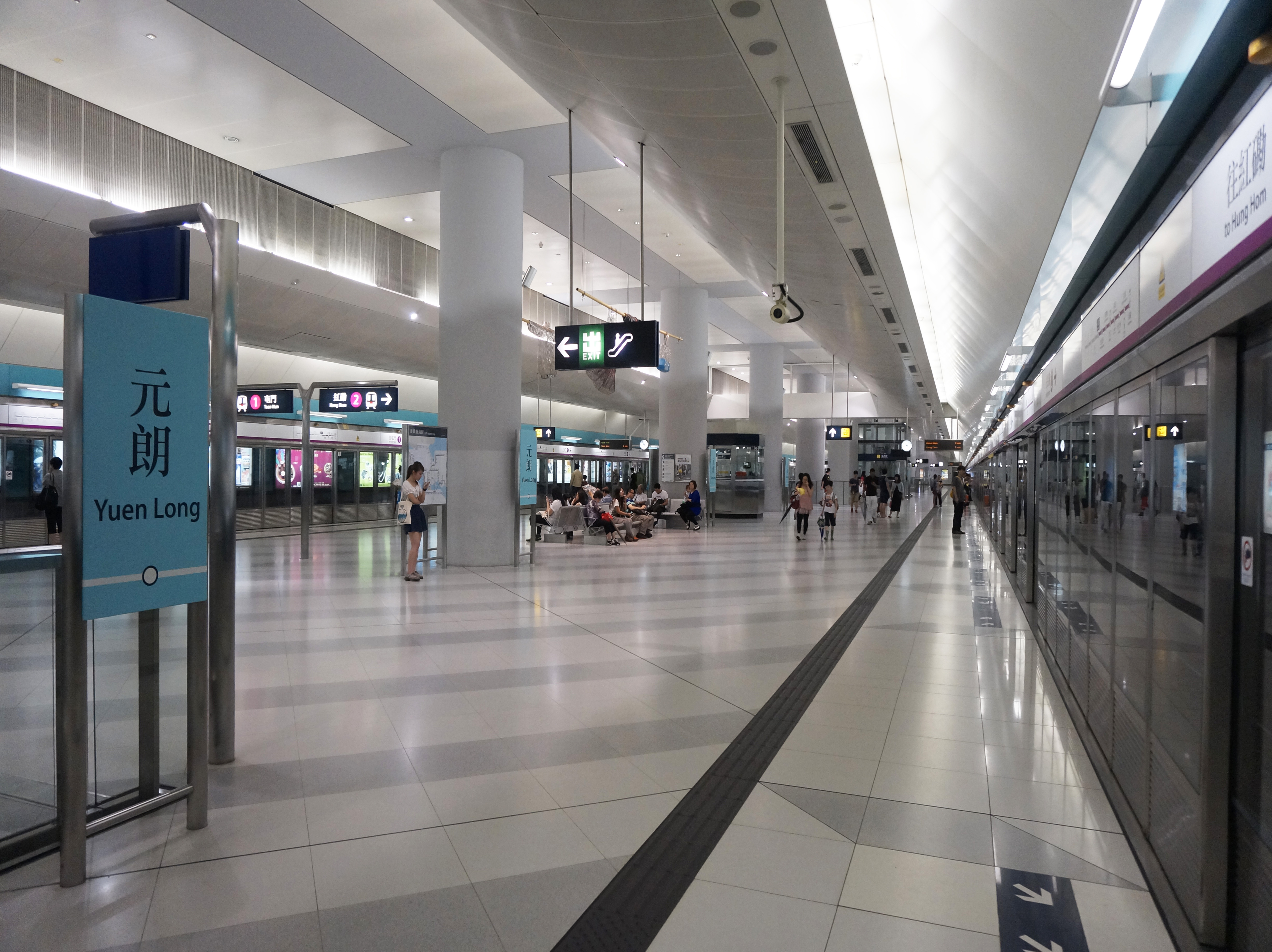 港鐵元朗站月台